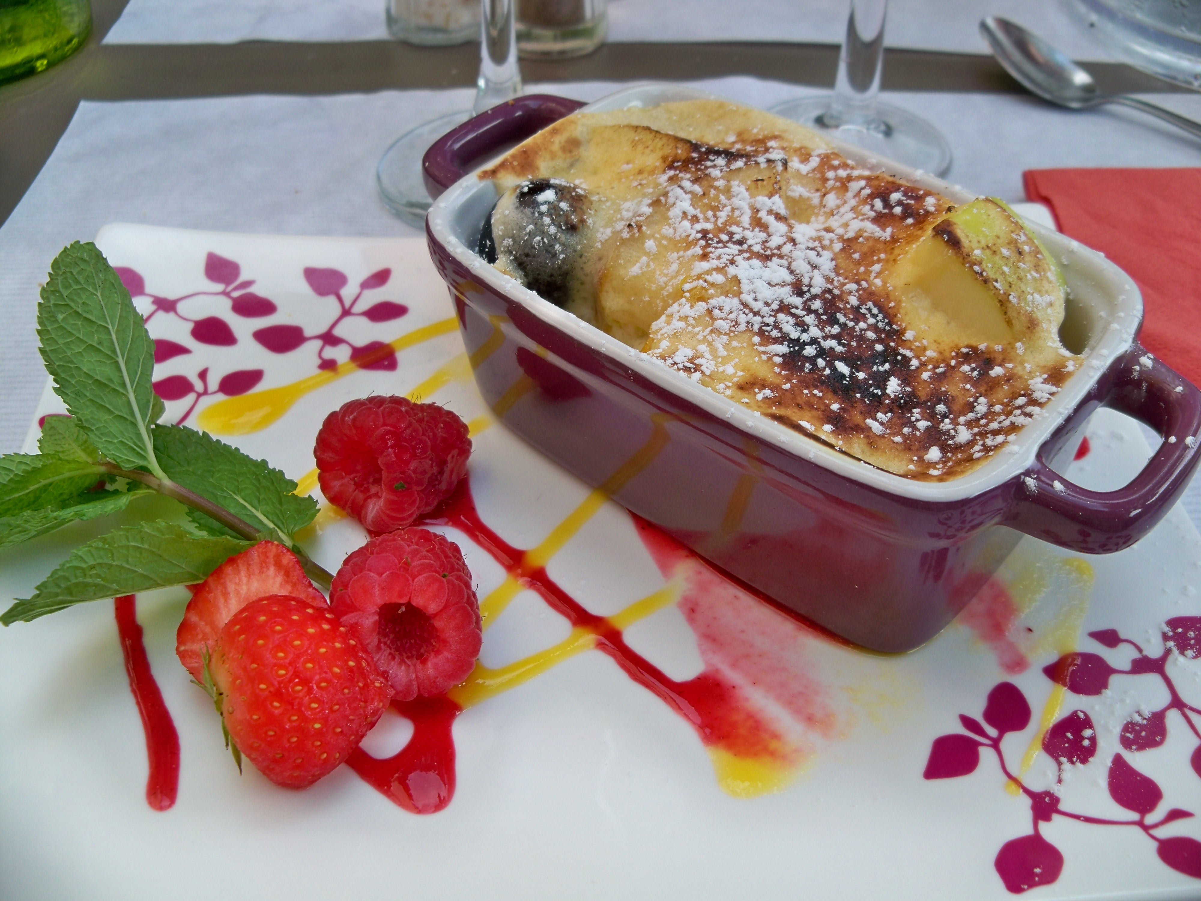 gratin de fruits frais, au bistrot de pays de Rochegude